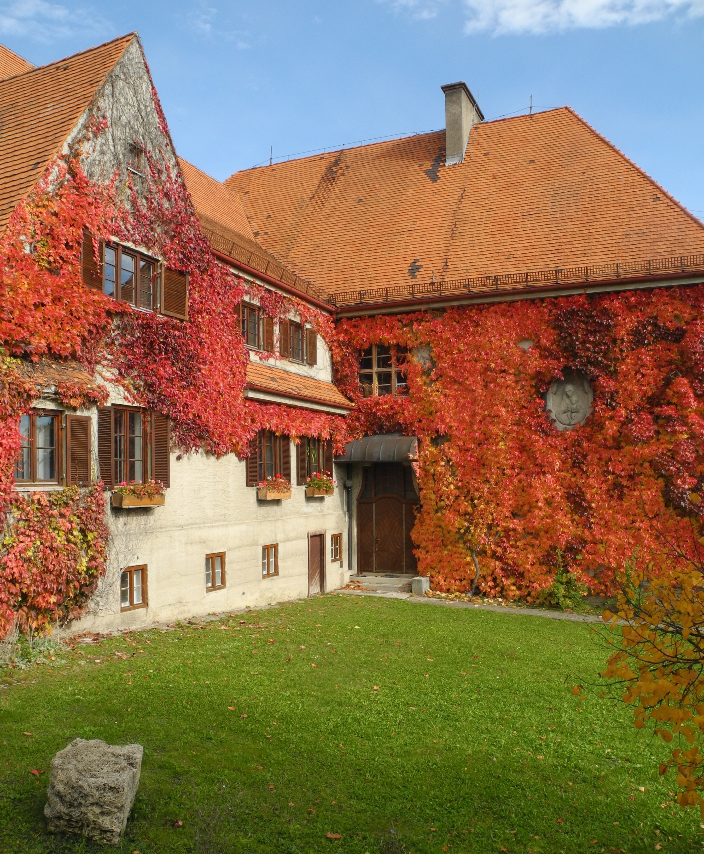 Wessobrunn - Rathaus mit Weinreben